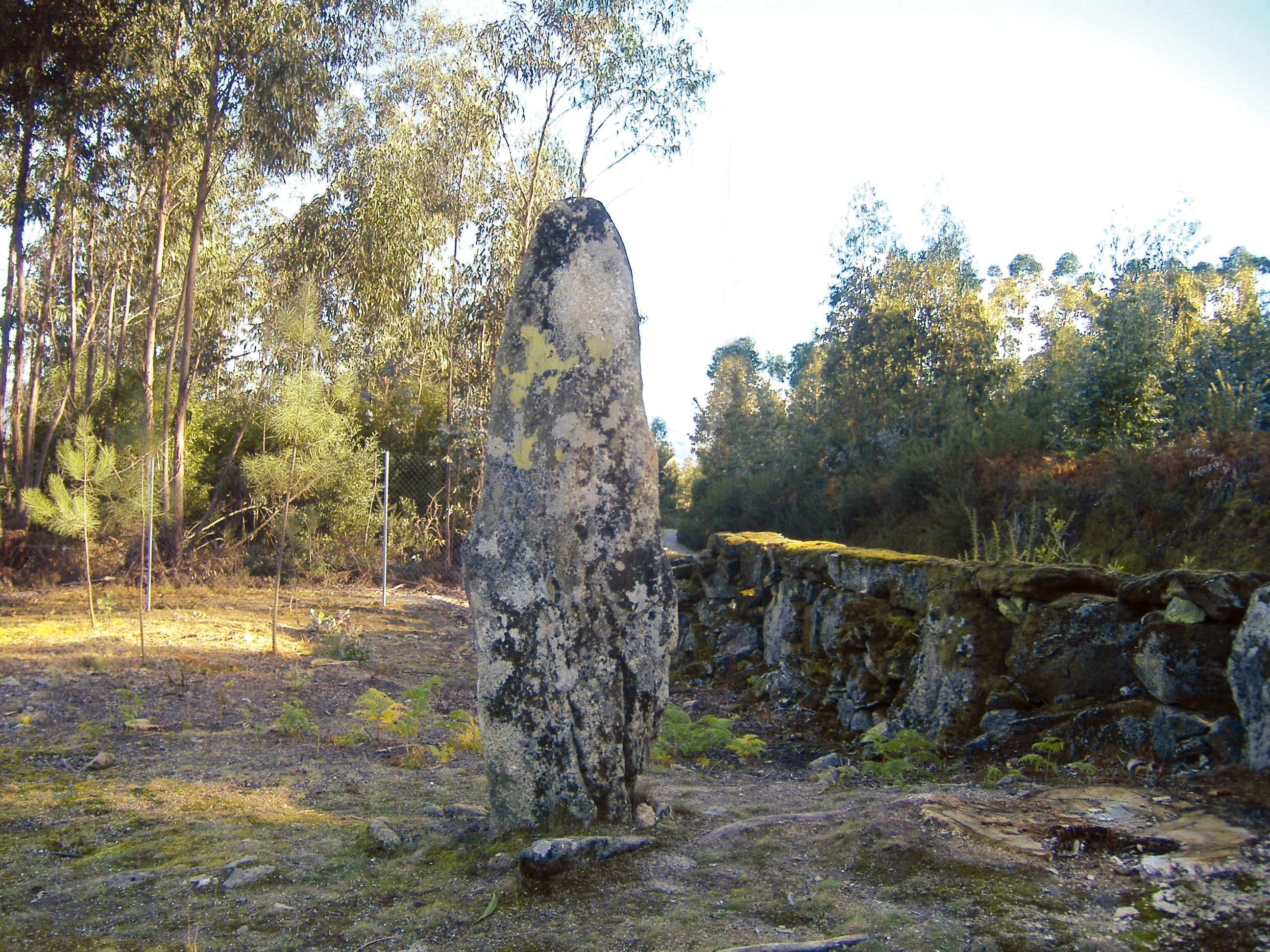 Menir de Luzim, também conhecido por «Marco de Luzim»- Penafiel, Luzim, Tapada de Sequeiros, E.N. 312 Monumento megalítico constituído por um monólito granítico de secção sub-pentagonal, implantado verticalmente no solo e atingindo cerca de 2 metros de altura. Classificação: I.I.P., Decreto N.º 251/70, de 03 de Junho de 1970